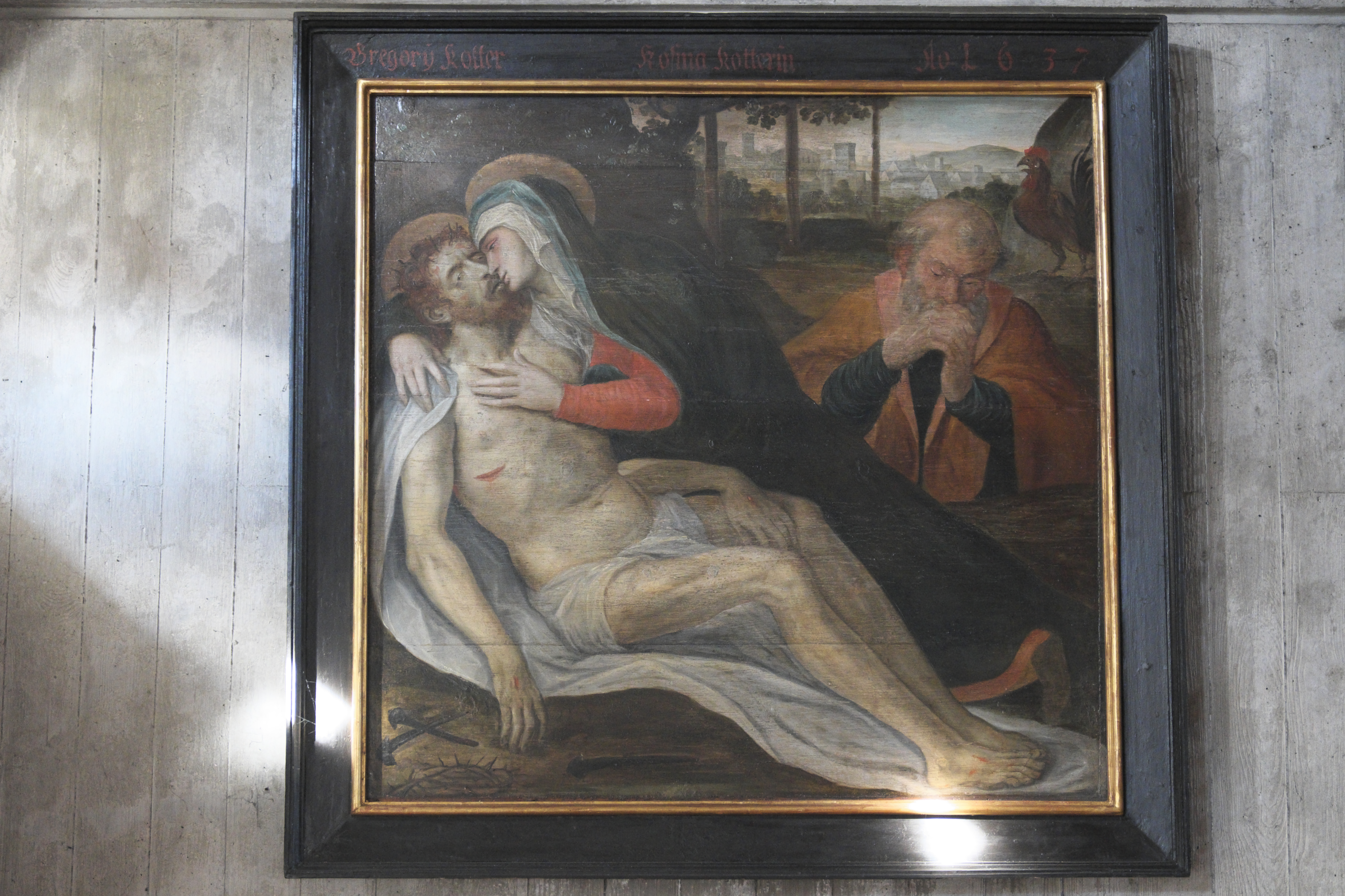 Katholische Pfarrkirche St. Peter in Wielenbach im Landkreis Weilheim-Schongau (Bayern/Deutschland), Pietà von 1637